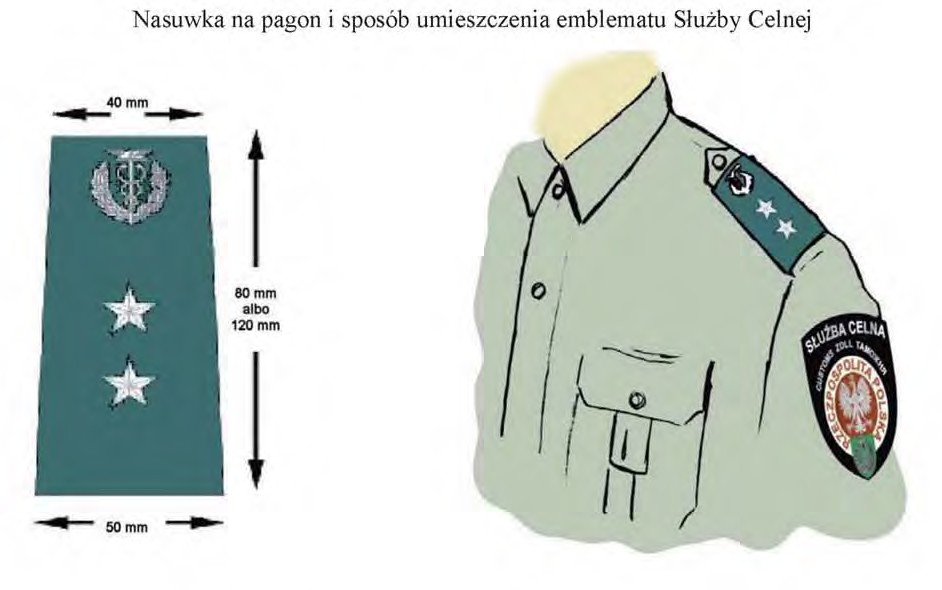 Nasuwka na naramiennik oraz sposób noszenia emblematu SC